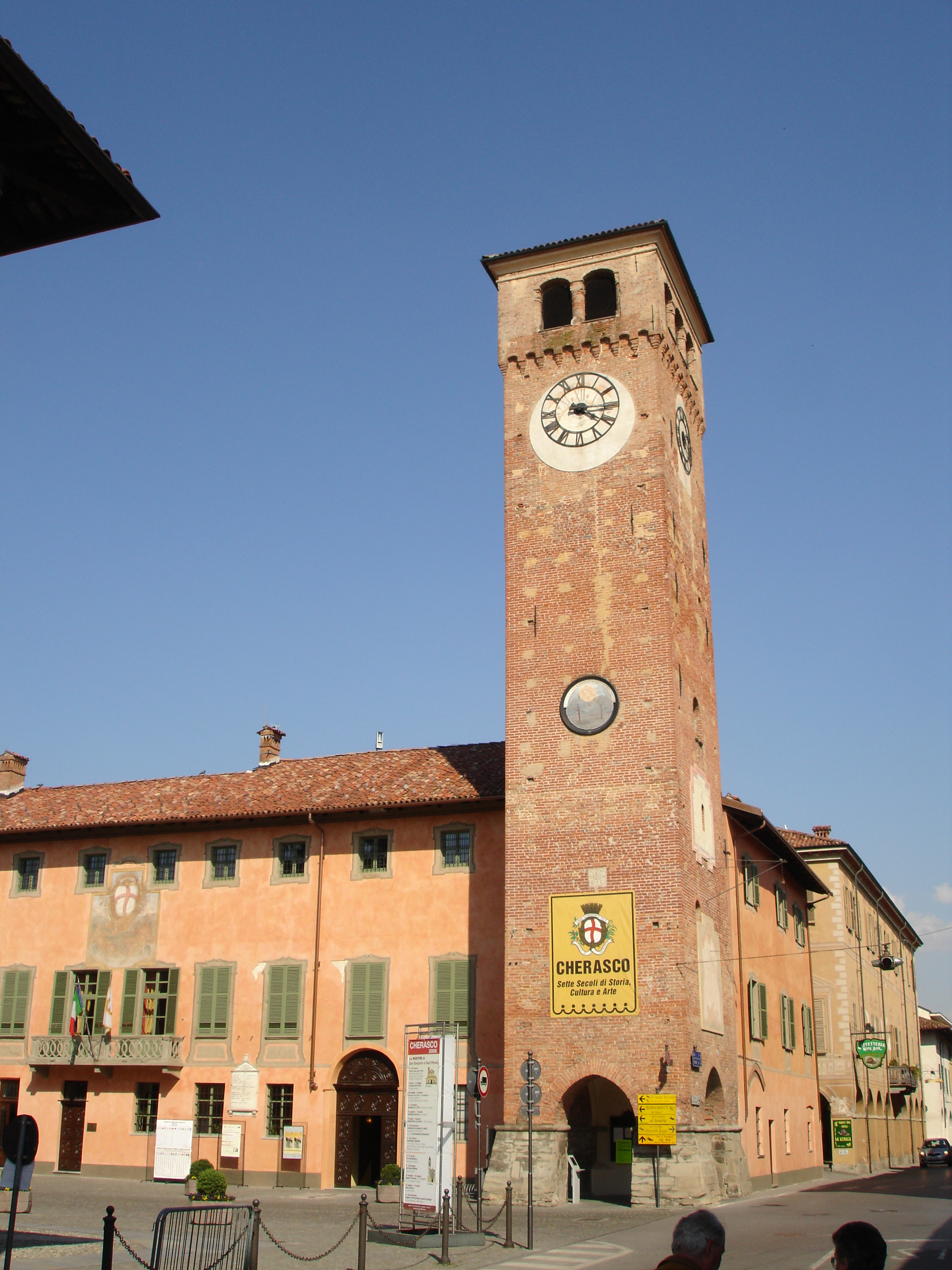 Cherasco (Cuneo): torre civica